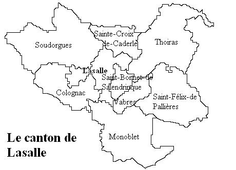 Le canton de Lasalle Image personnelle